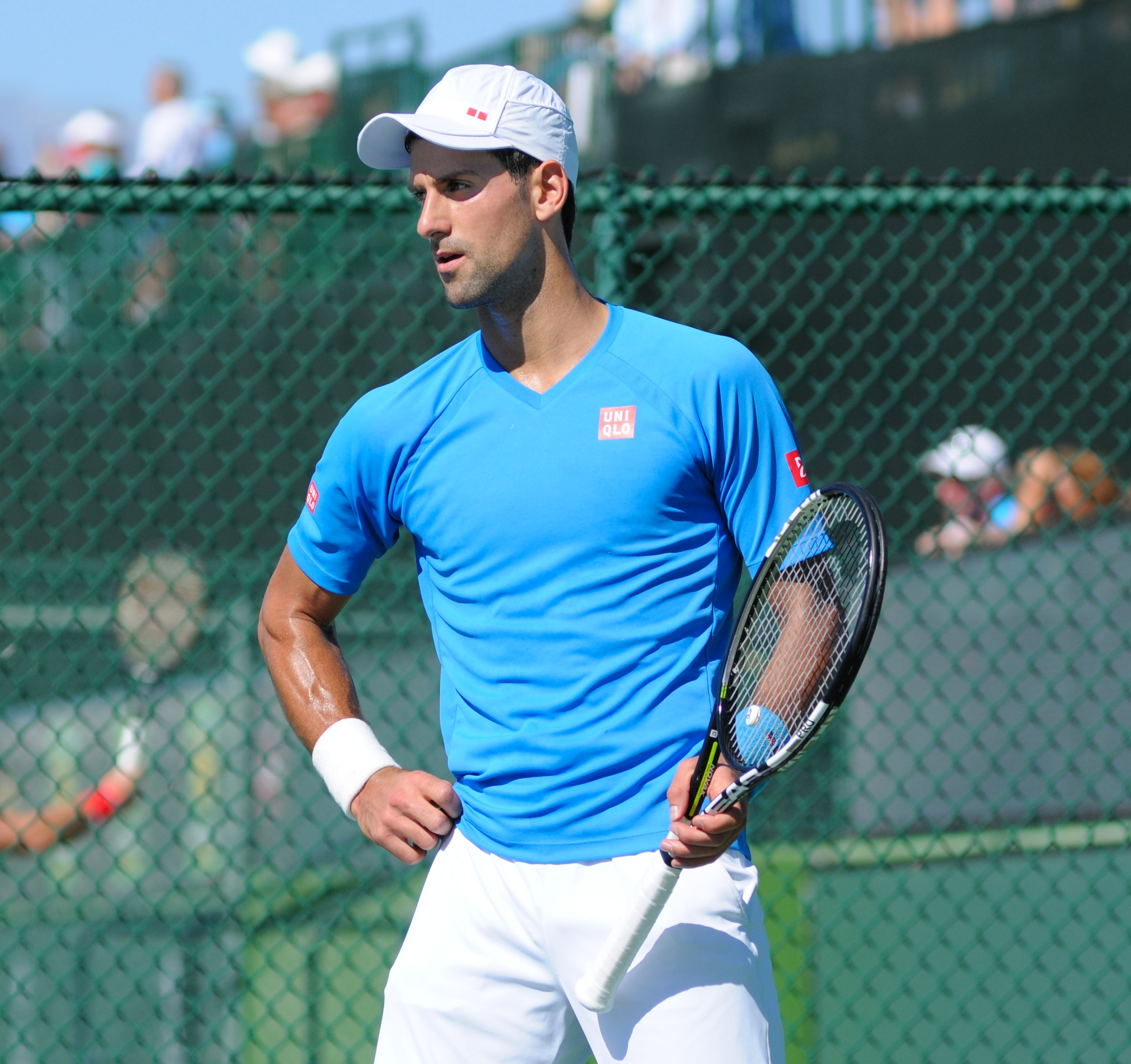 2015 BNP Paribas Open